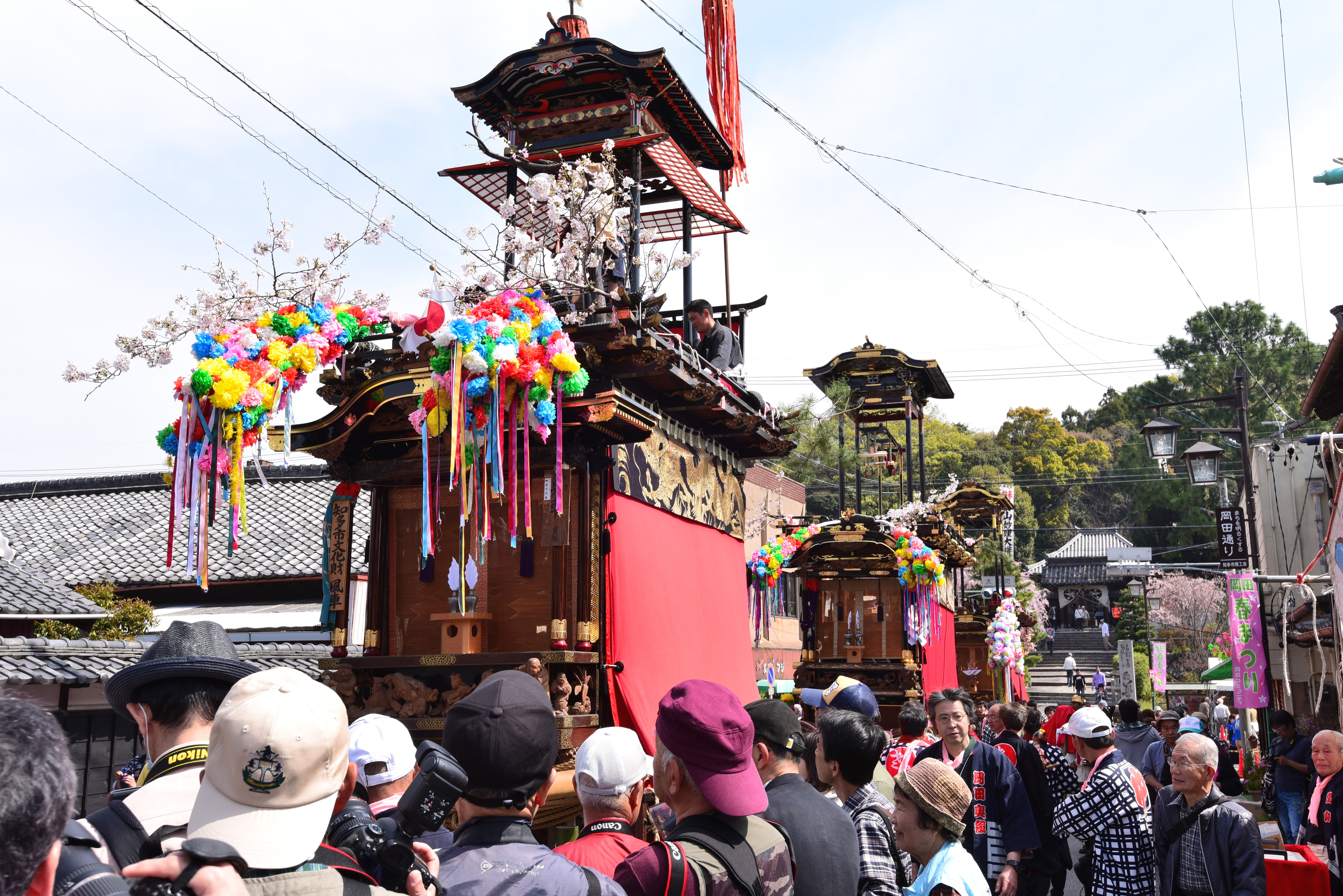 岡田春まつりの山車